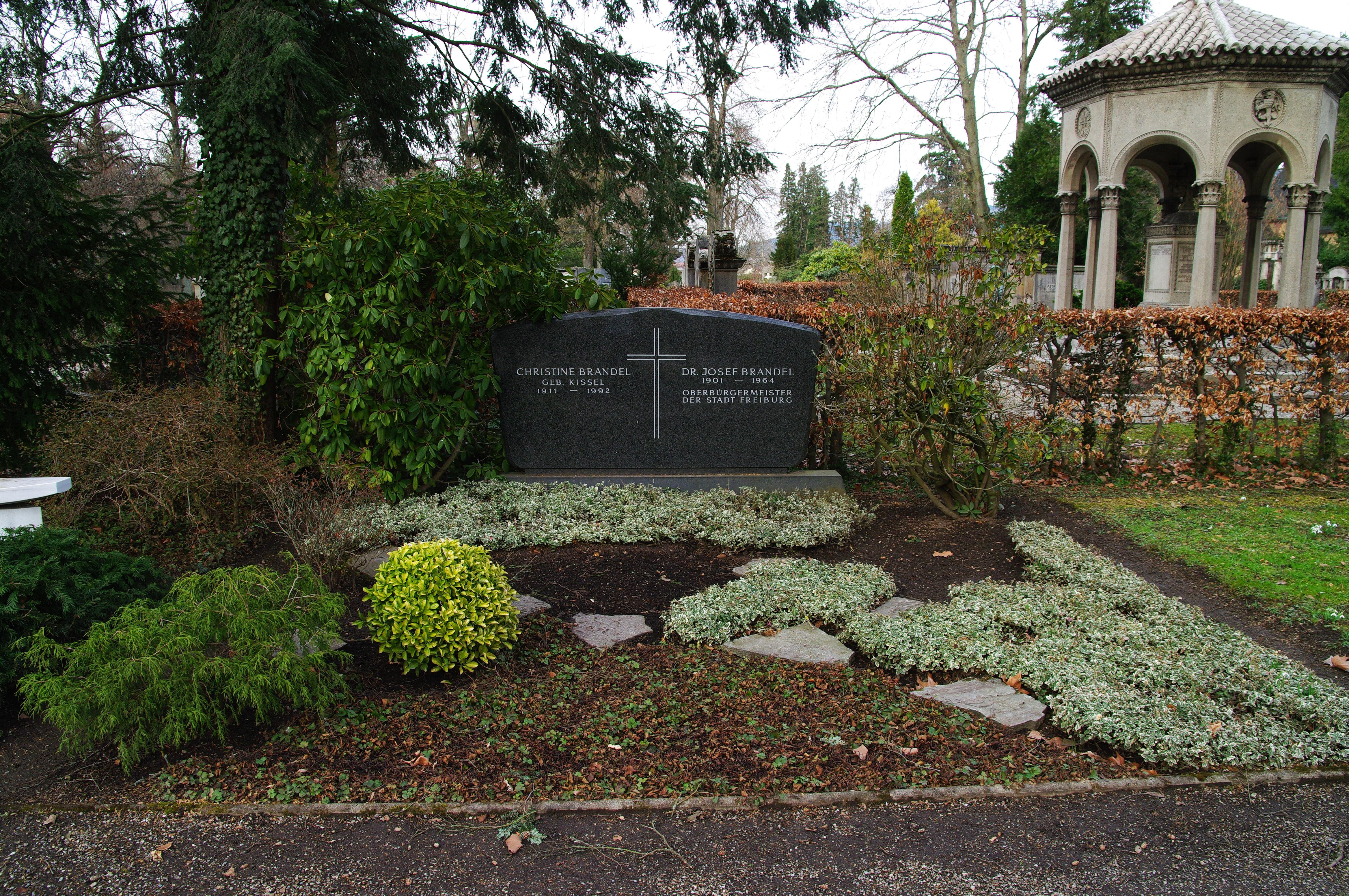 Bilder vom Hauptfriedhof Freiburg